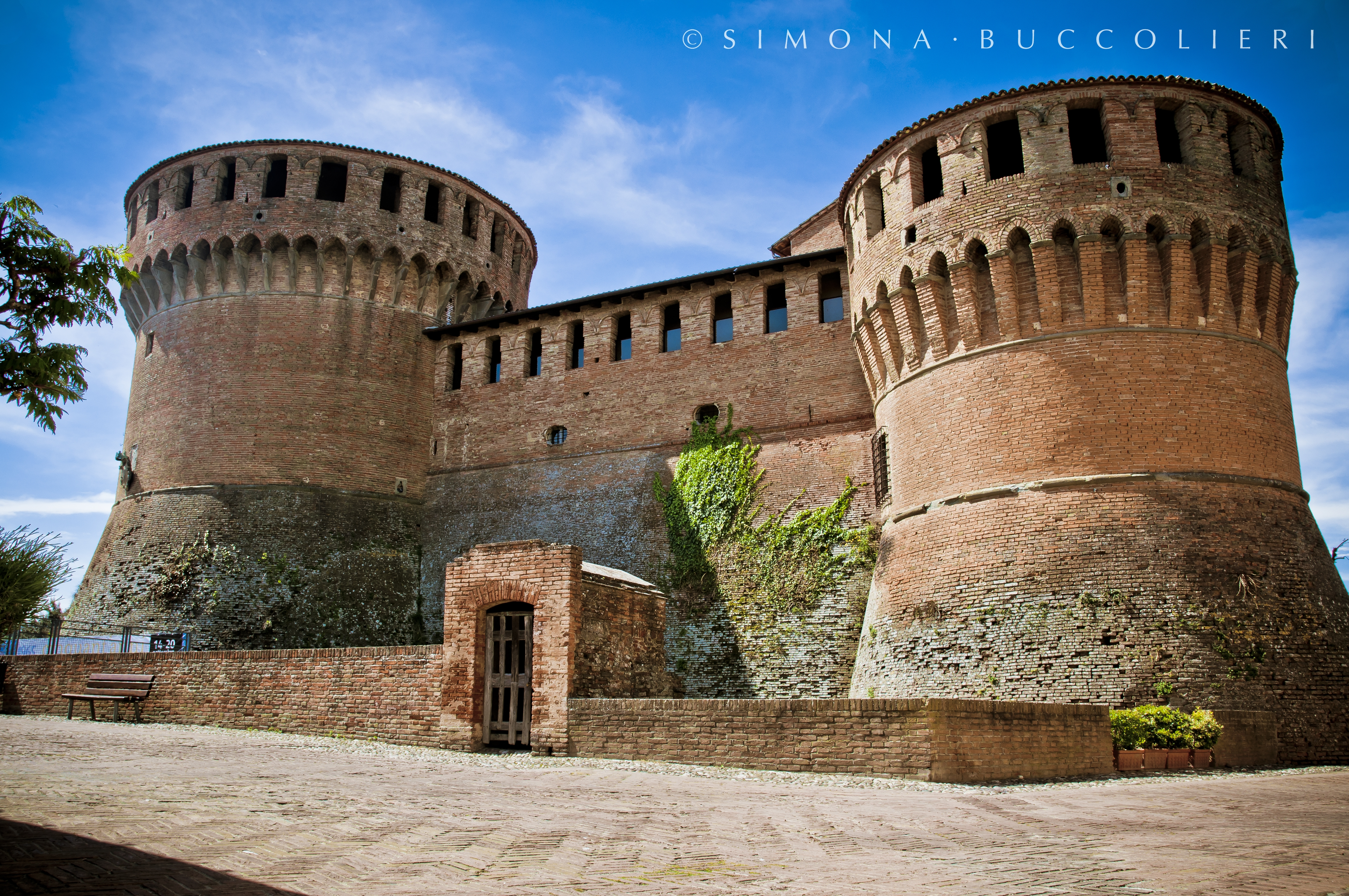 Rocca di Dozza This is a photo of a monument which is part of cultural heritage of Italy.